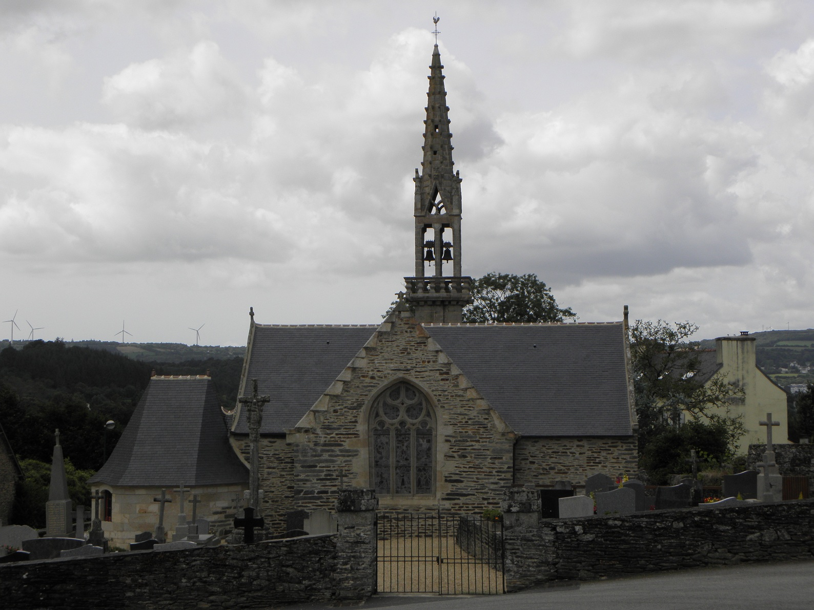 Chevet de l'église Saint-Coulitz (29) en la commune éponyme.